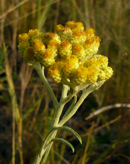 Бессмертник, или Цмин песчаный (Helichrysum arenarium). Балка Каменный Лог, Белгородская область.